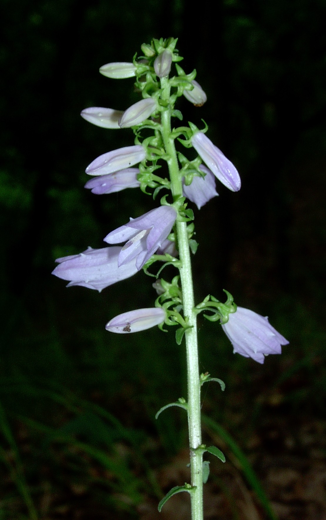 Campanula sibirica. Bielinek NW Poland